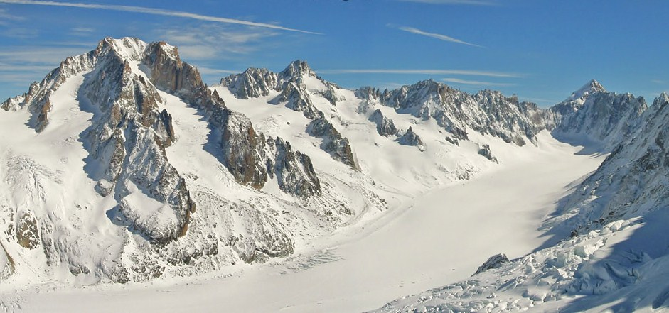 Aiguille d'Argentiere (links oben), Tour Noir, Mont Dolent, in der Bildmitte: Glacier d'Argentiere